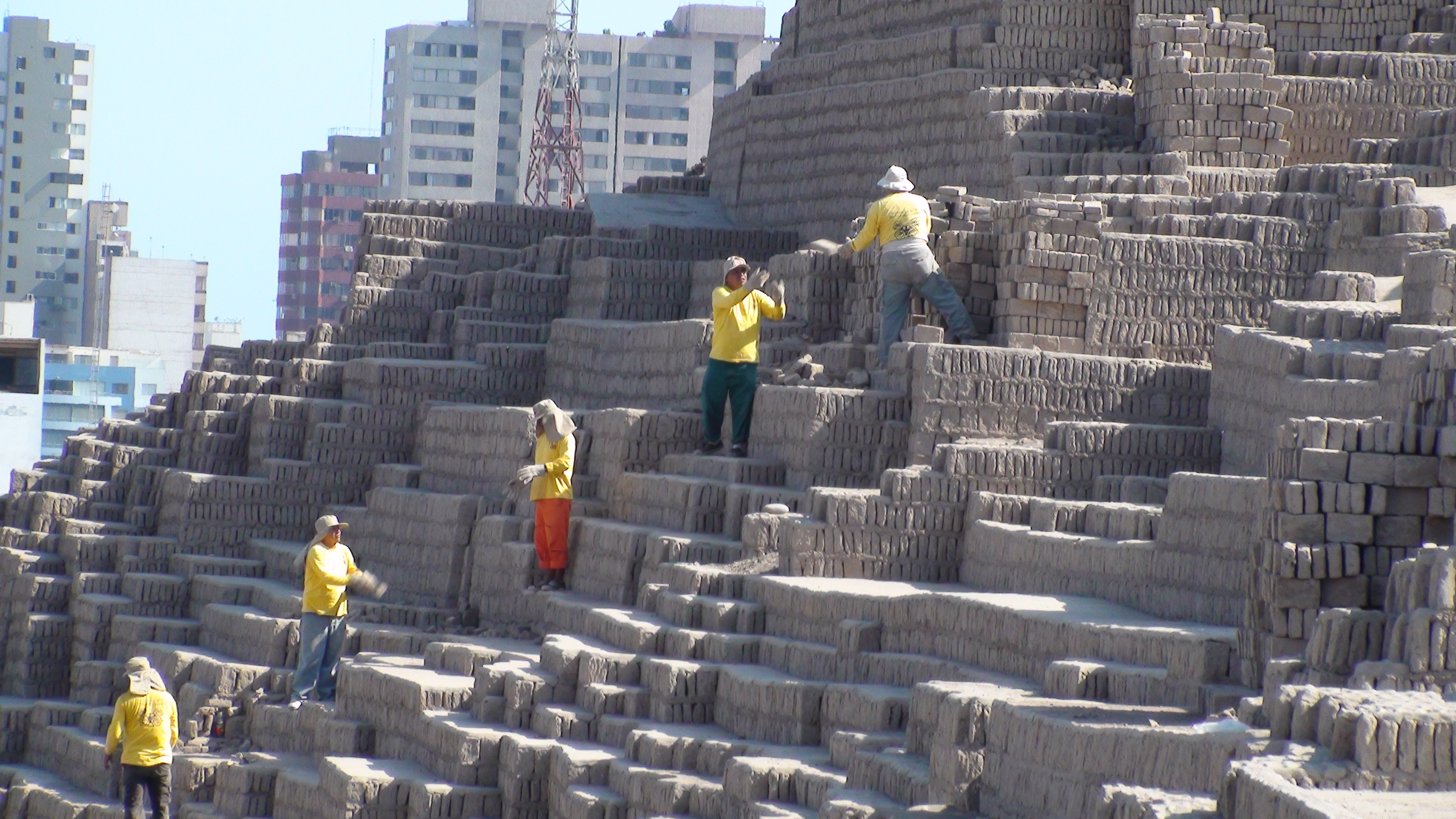 Pucllana Archaeological site (restoration)